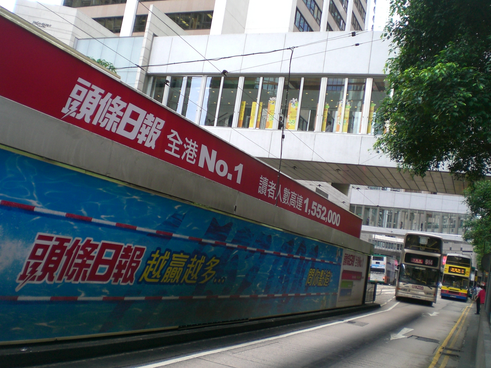 中文（香港）: 頭條日報